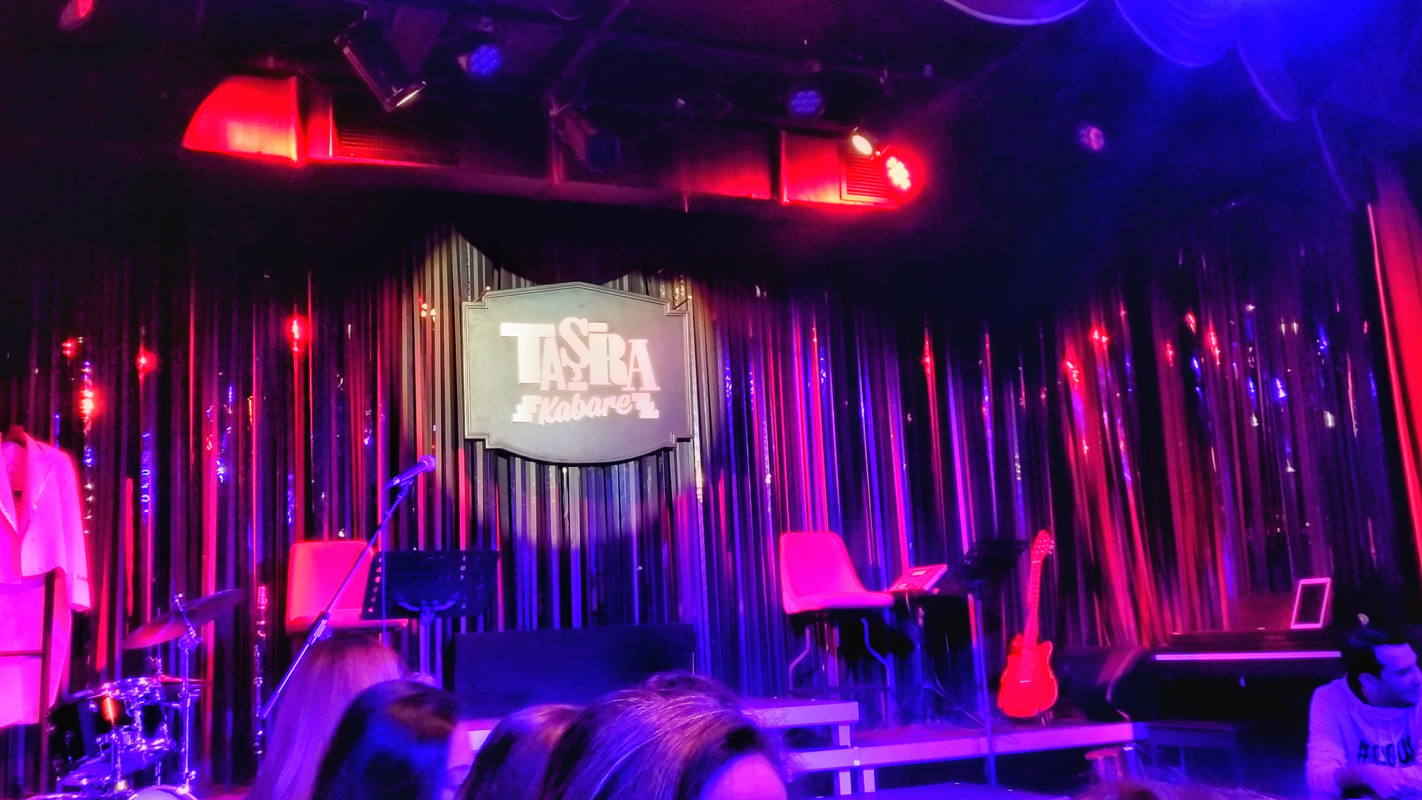 Taşra Kabare'nin kabare salonu görüntüsü